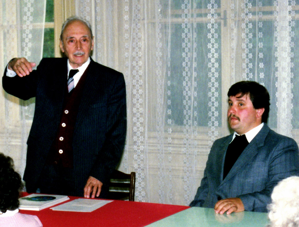 Lükő Gábor (balra) az Ipolyi Arnold Népfőiskola előadójaként és Harangozó Imre (jobbra) a program levezető elnökeként az Ókígyósi Wenckheim-kastélyban